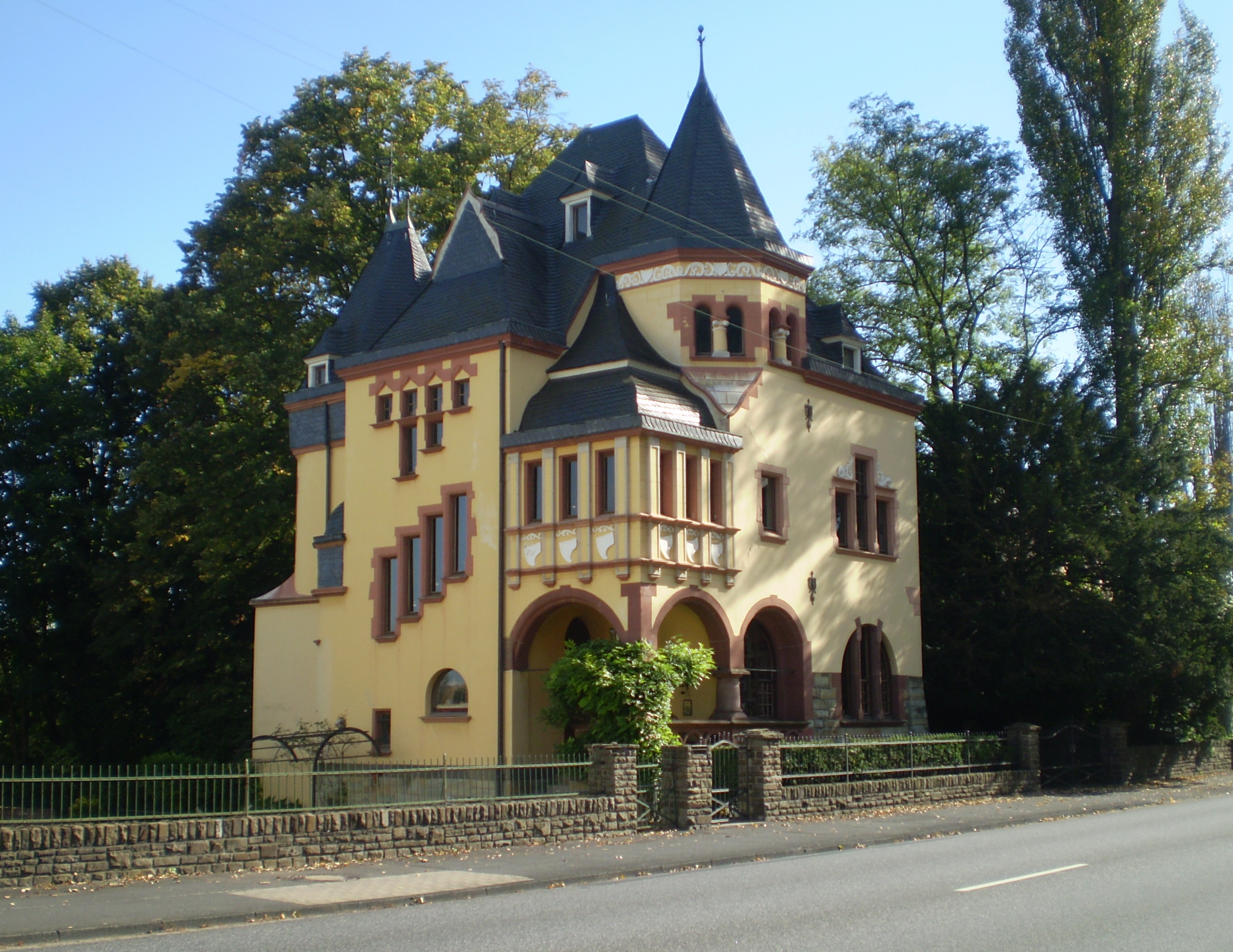 Denkmalgeschützte Putzvilla Bonner Straße 20 an der Bundesstraße 9, Rolandseck